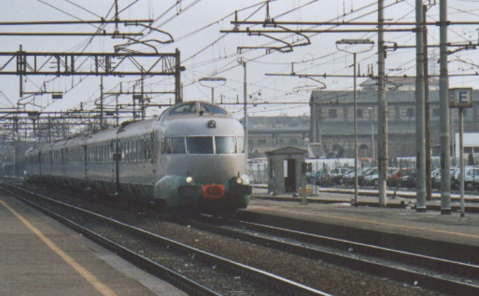 L'elettrotreno ETR.302 in transito a Piacenza nel marzo del 2003.